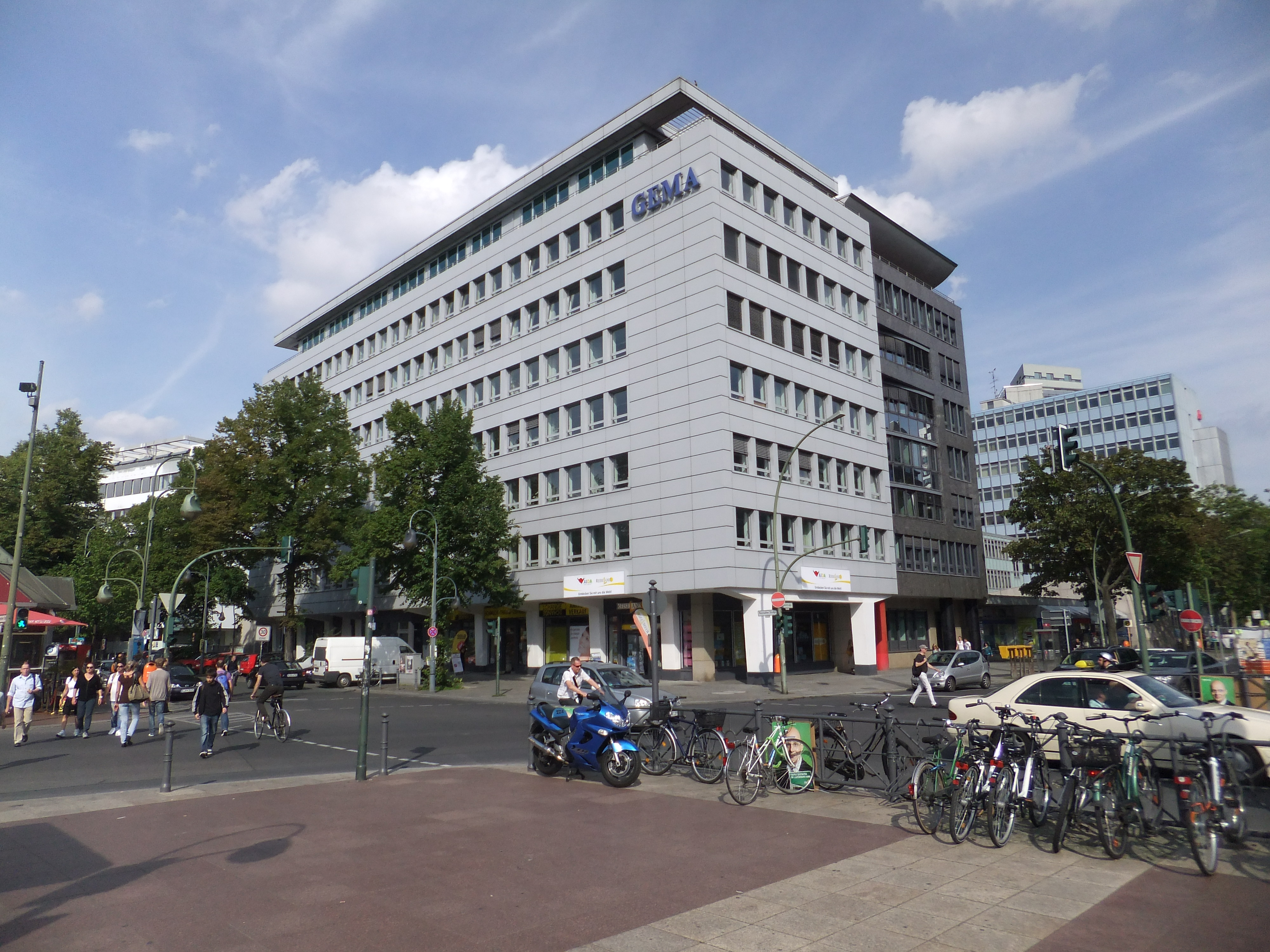 Sitz der Gesellschaft für musikalische Aufführungs- und mechanische Vervielfältigungsrechte (GEMA) in Berlin